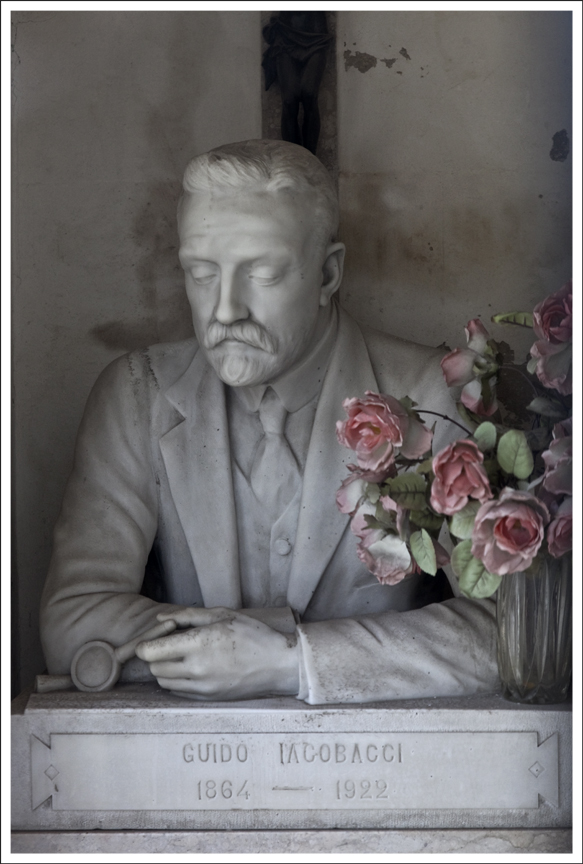 Tumba de Guido Jacobacci